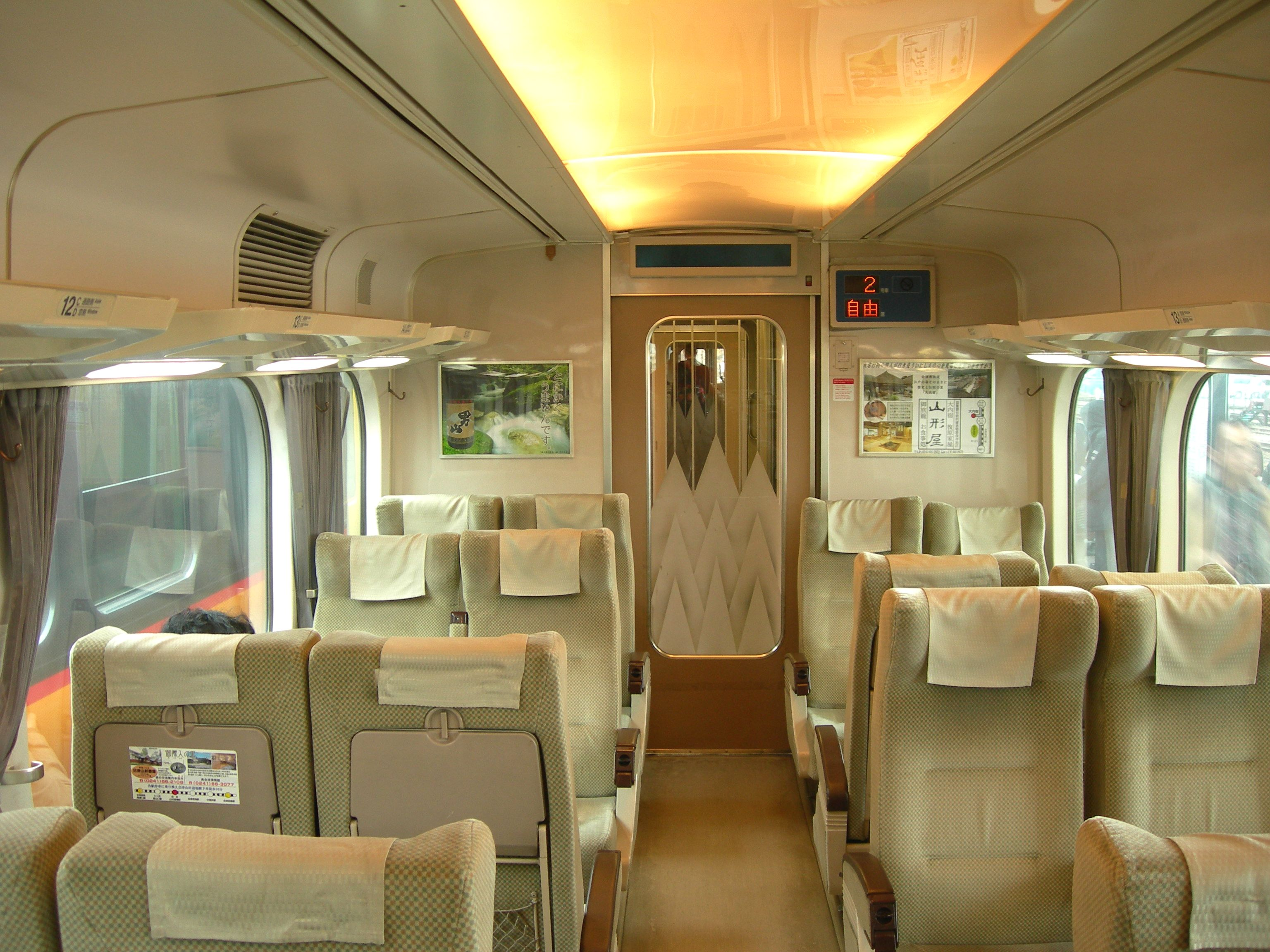 会津鉄道キハ8500系気動車 車内